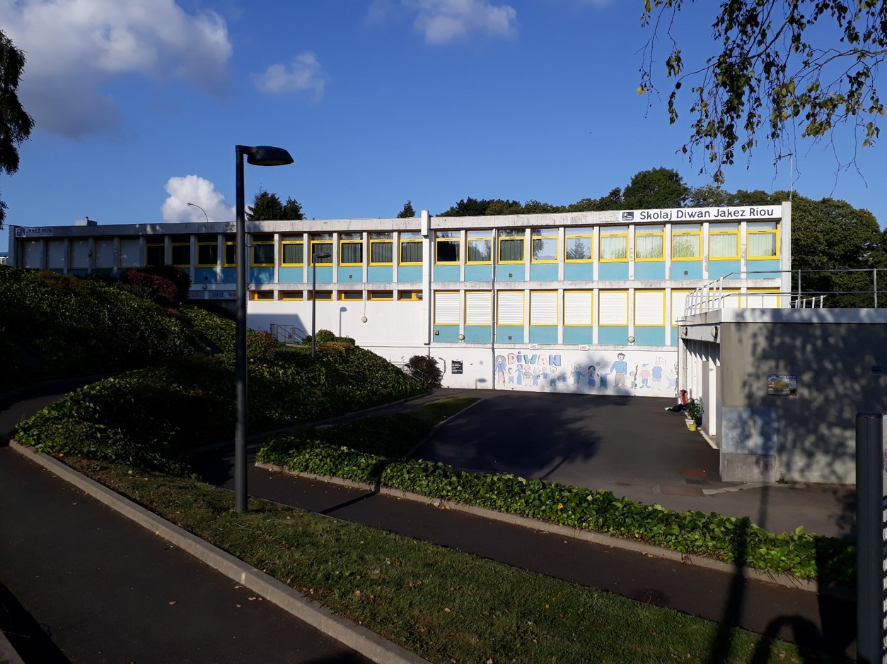 Skolaj gwelet eus ar Straed Vañde